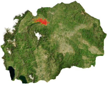 Situación de Skopje dentro de Macedonia